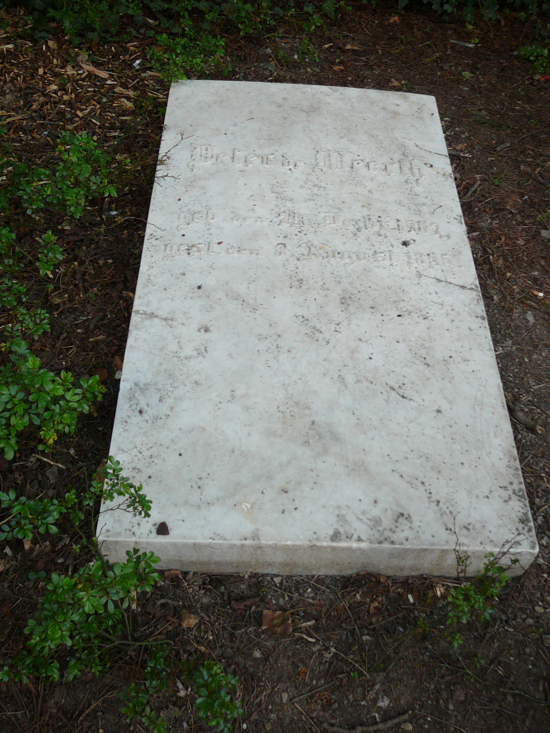 Luisenstraße, Wuppertal